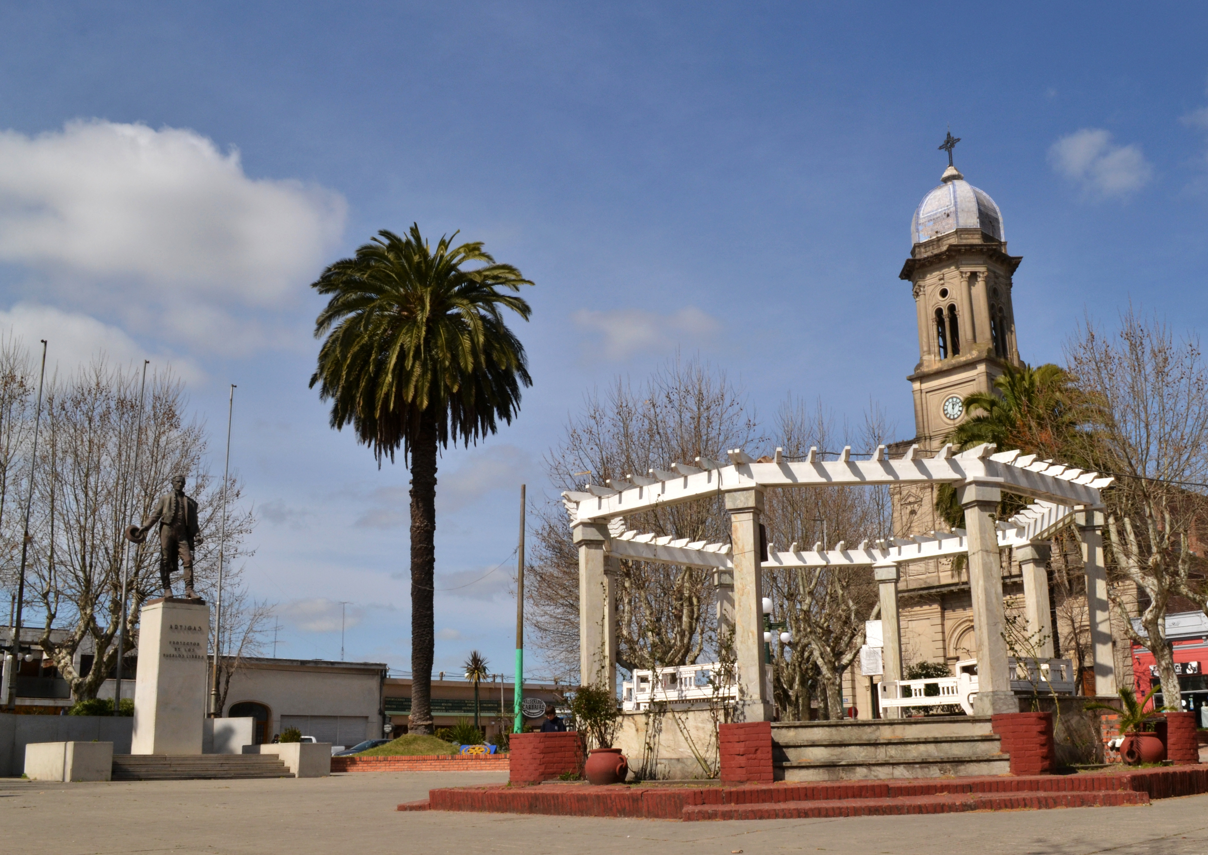 Monumento a Artigas (Rosario). Ubicada en el departamento de Colonia